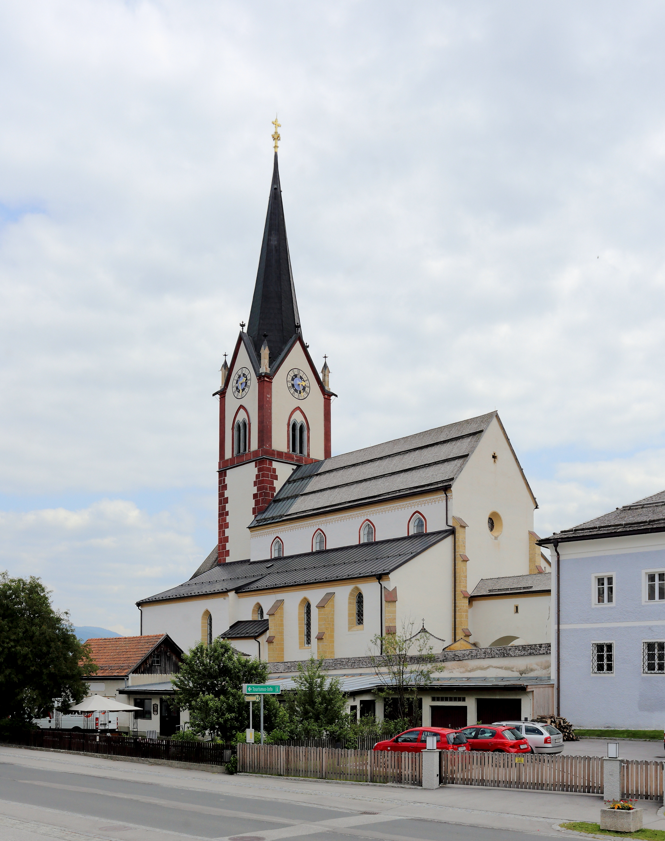 Katholischen Pfarr- und Wallfahrtskirche Unsere Liebe Frau Mariä Himmelfahrt in der Salzburger Gemeinde Mariapfarr. Ein romanischer Bau im 12/13. Jahrhundert errichtet (heutiges Presbyterium) und später im 15. Jahrhundert als gotischer Bau aus- und umgebaut. 1946 wurden Fresken aus dem 13. und 14. Jahrhundert freigelegt.